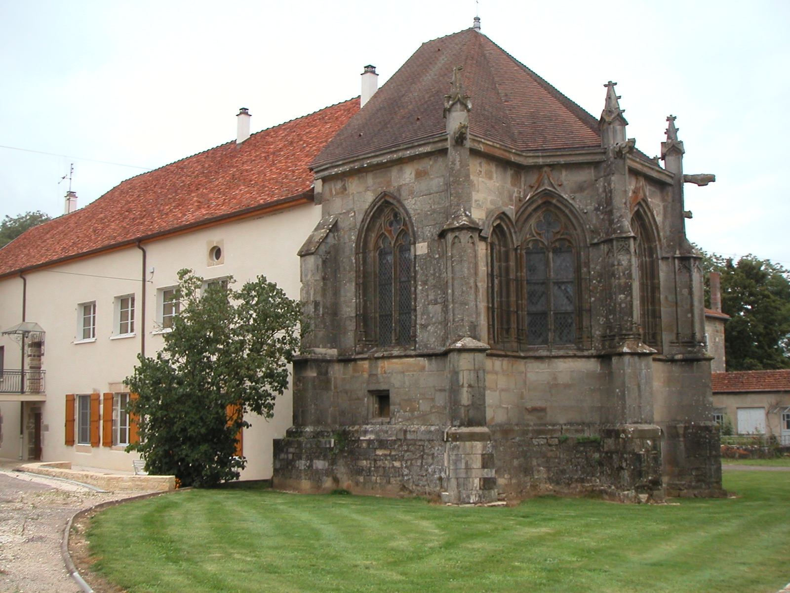 La chapelle de Château dessous, Chauvirey le Châtel